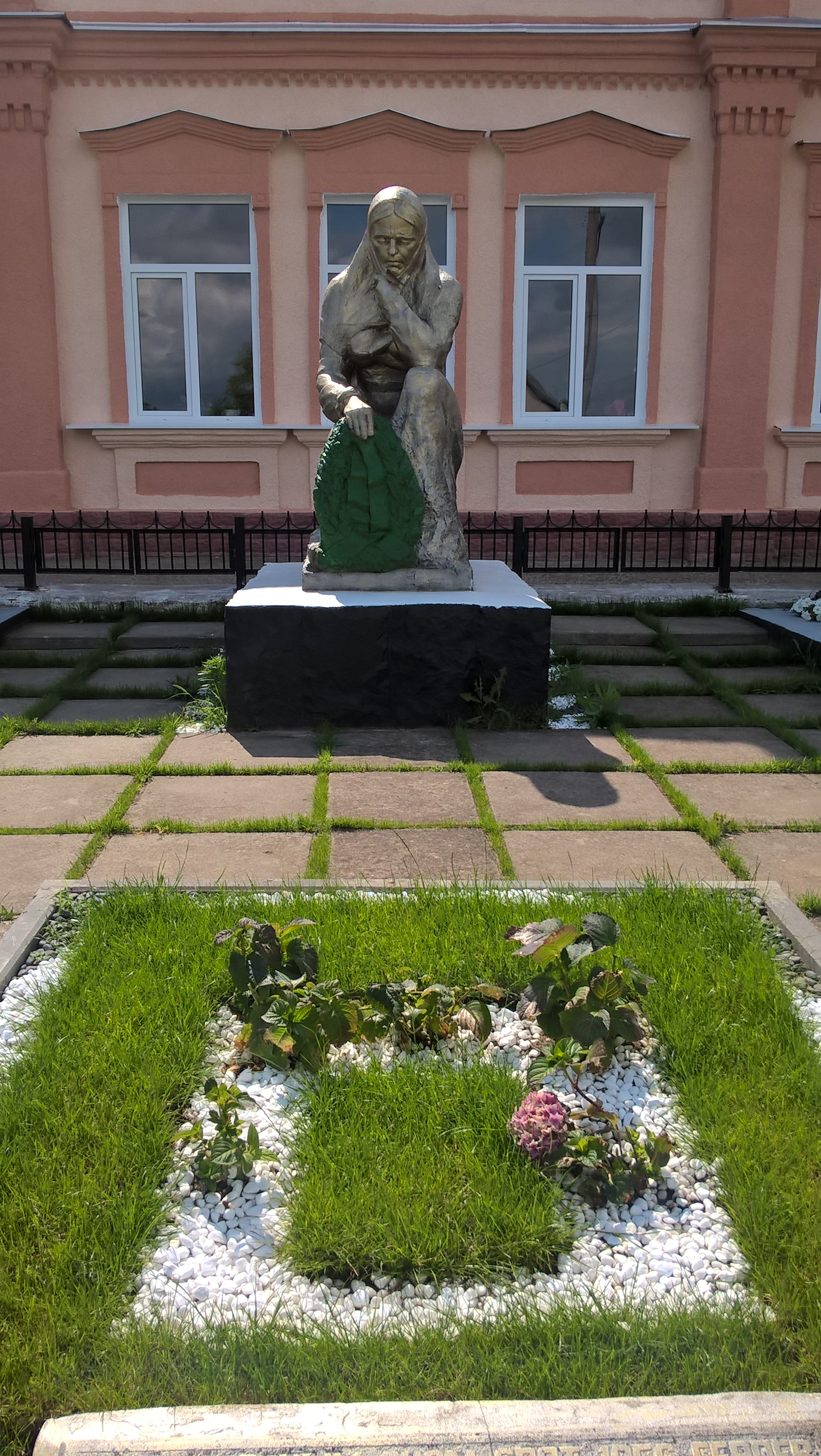 Pomnik na zbiorowej mogile żołnierzy radzieckich w Warnicy